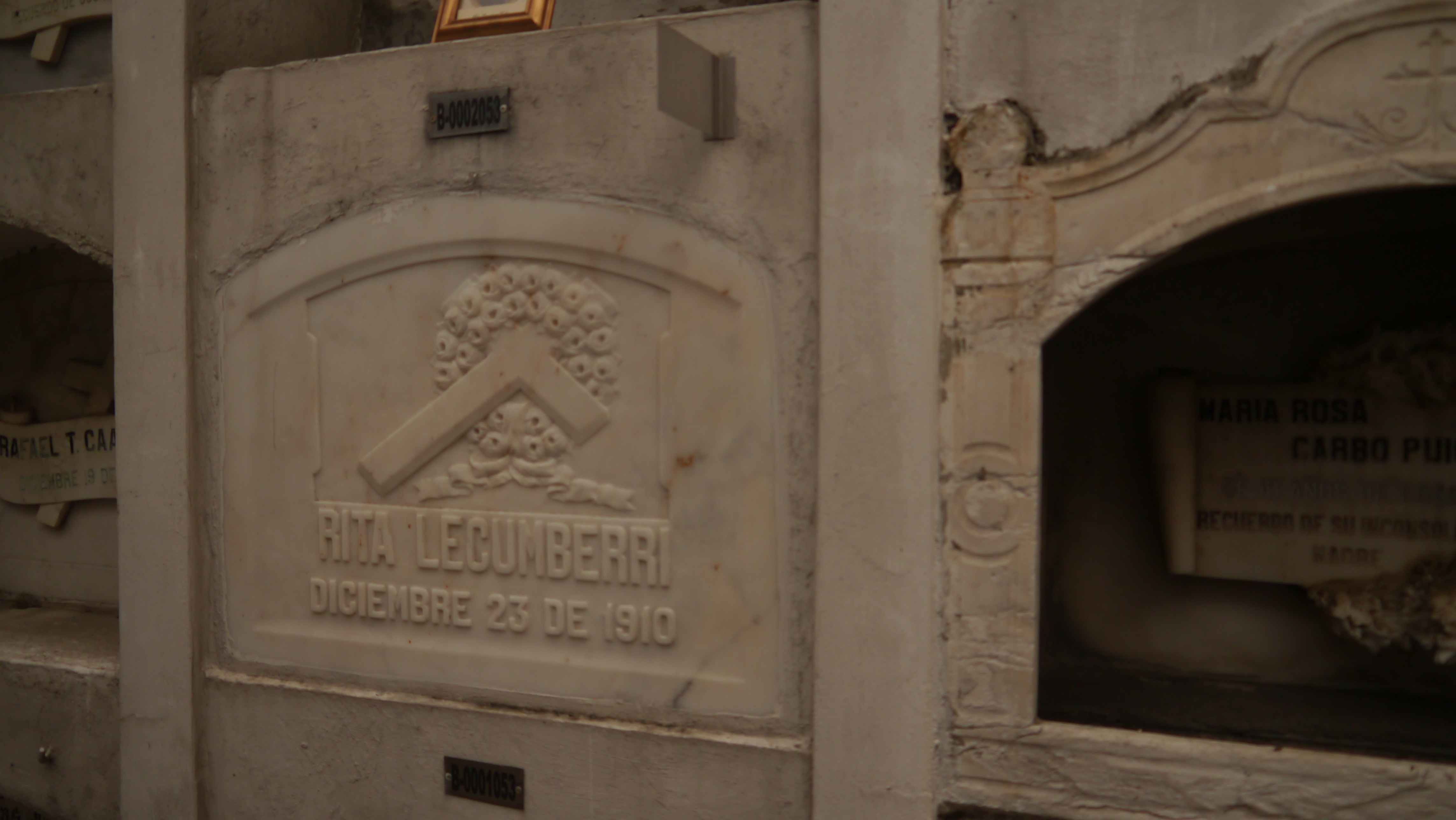 Bóveda de Rita Lecumberri, poetisa guayaquileña, en el Cementerio General de Guayaquil